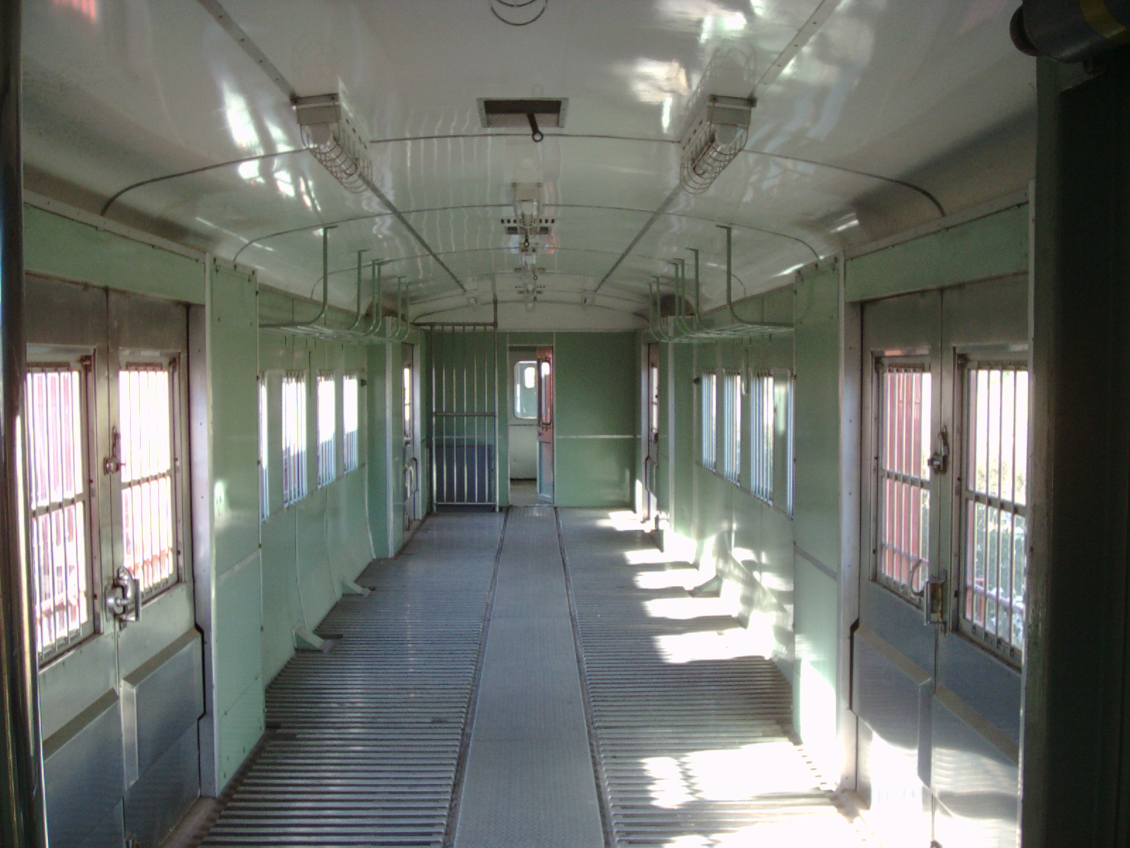 キニ58 1車内